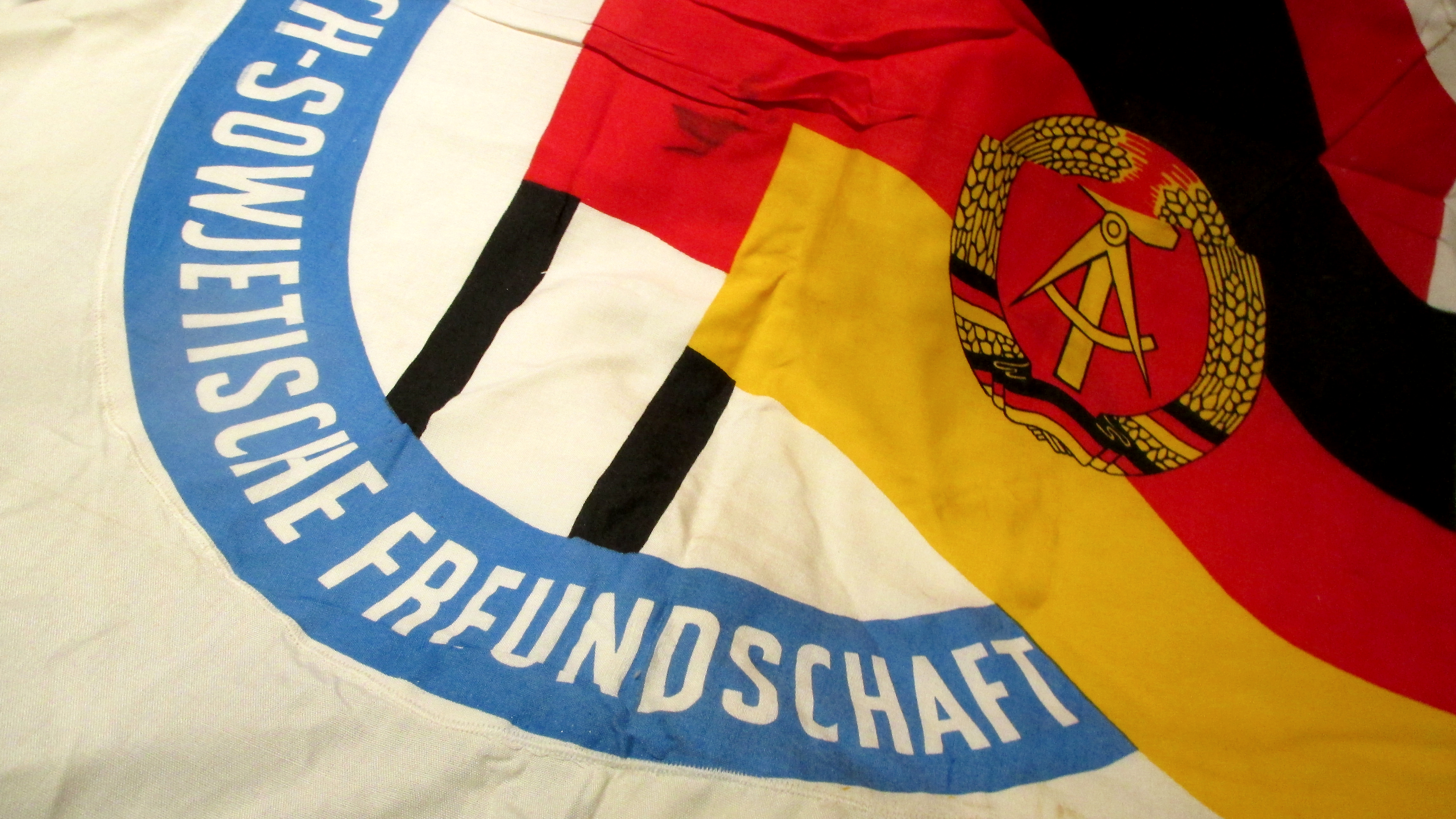 Deutsch Sowjetische Freundschaft_Große Stoff Mastfahne_DDR